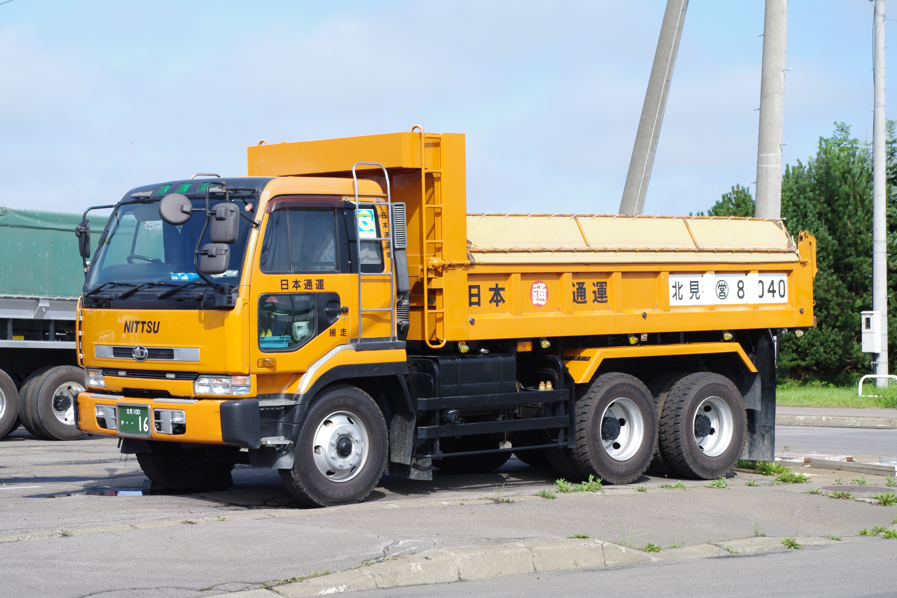 日本通運網走支店に所属するダンプカー